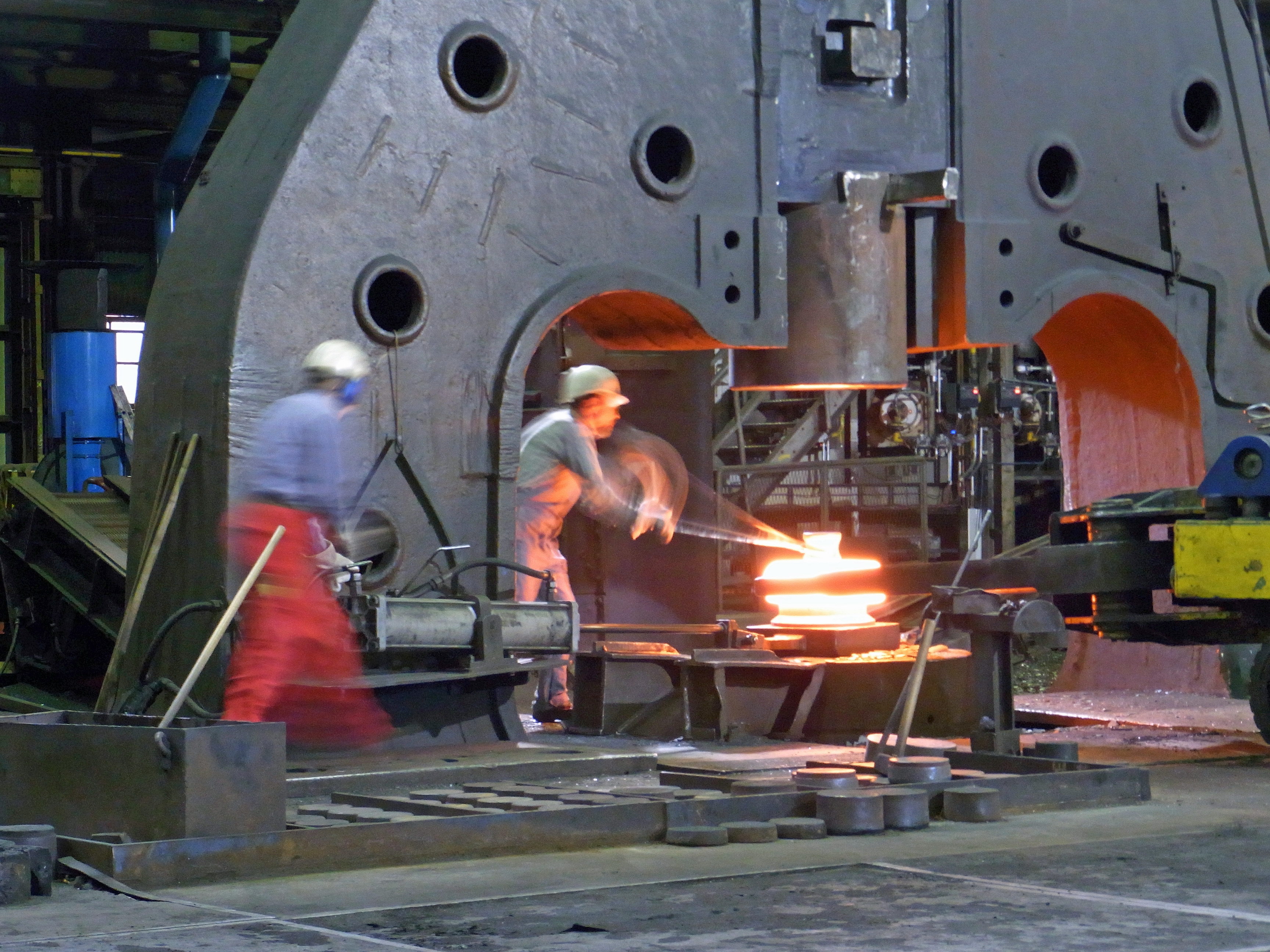 ExtraSchicht 2010 Radreifenproduktion im Bochumer Verein